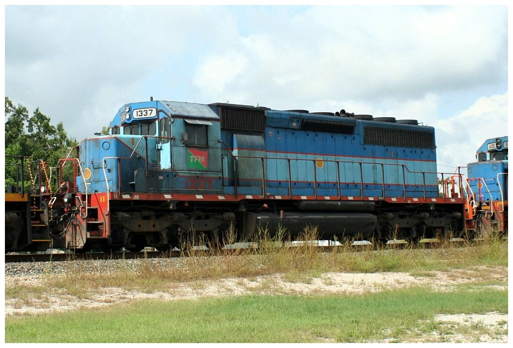 Transportación Ferroviaria Mexicana 1337, EMD SD40